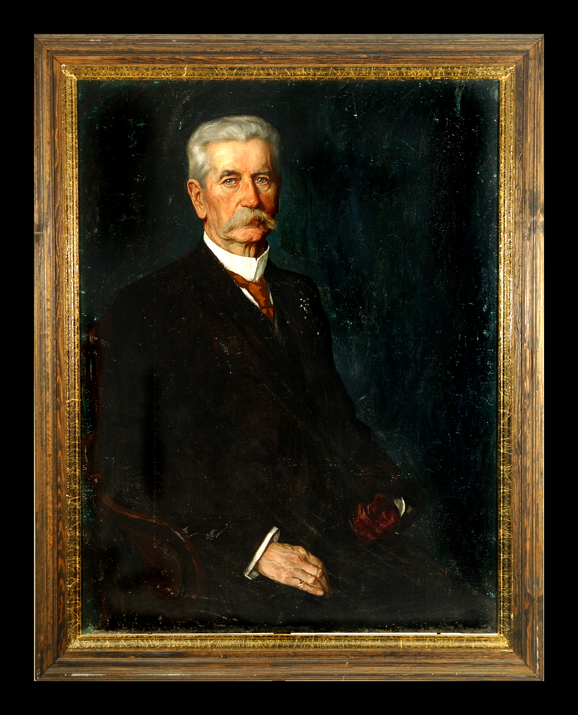 Bild von Hans Friedrich Heinrich Laue (in Familienbesitz)